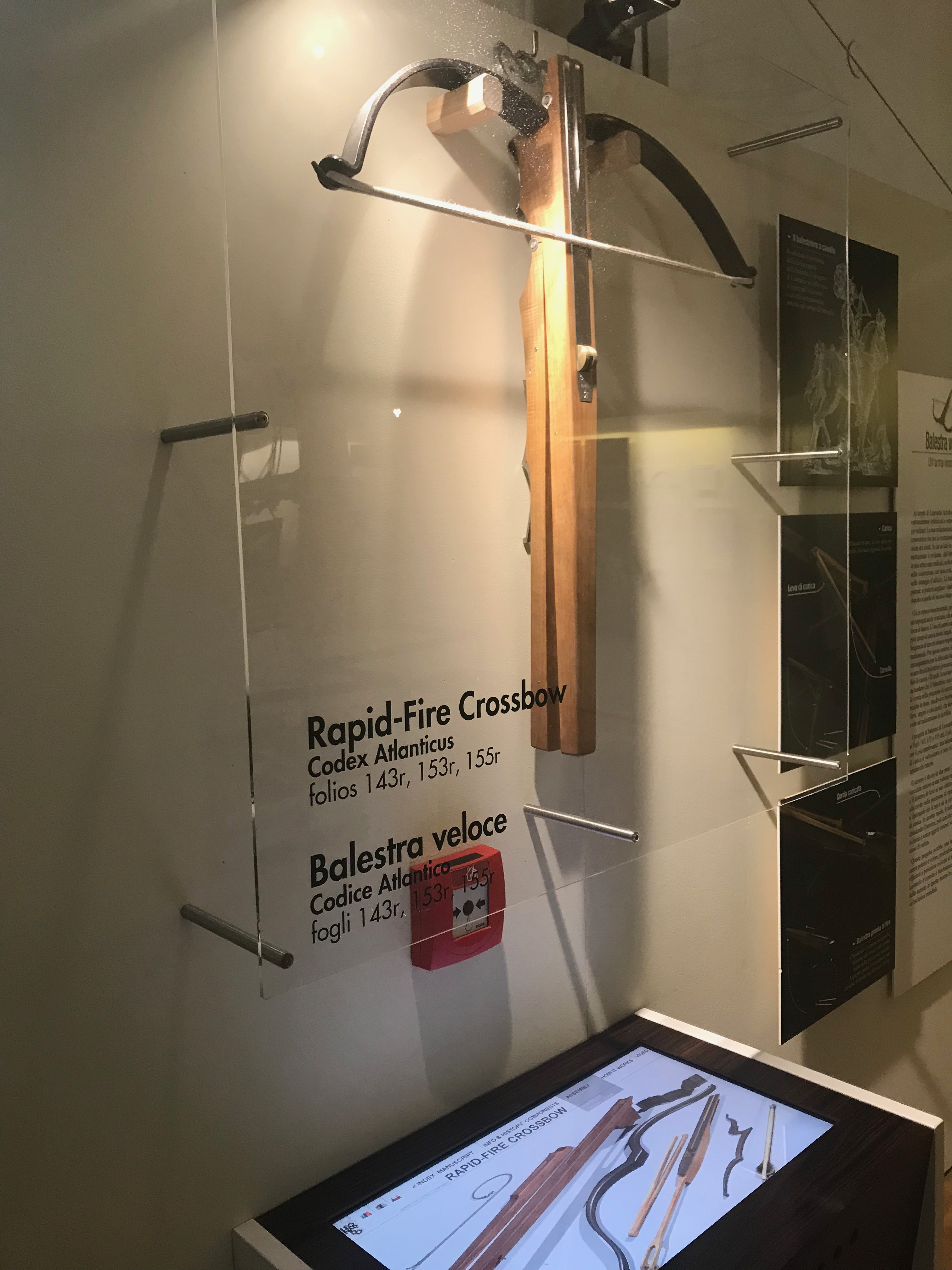 La Balestra Veloce di Leonardo fotografa al Mondo di Leonardo